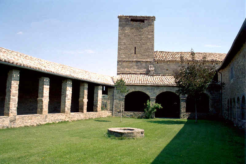 Claustro del Monasterio de Santa Fe en la provincia de Navarra, (España). Tomada por JMSE el 9 de julio de 2003 y cedida a Wikipedia. Categoría: España (imagen) Categoría: Monumentos (imagen)